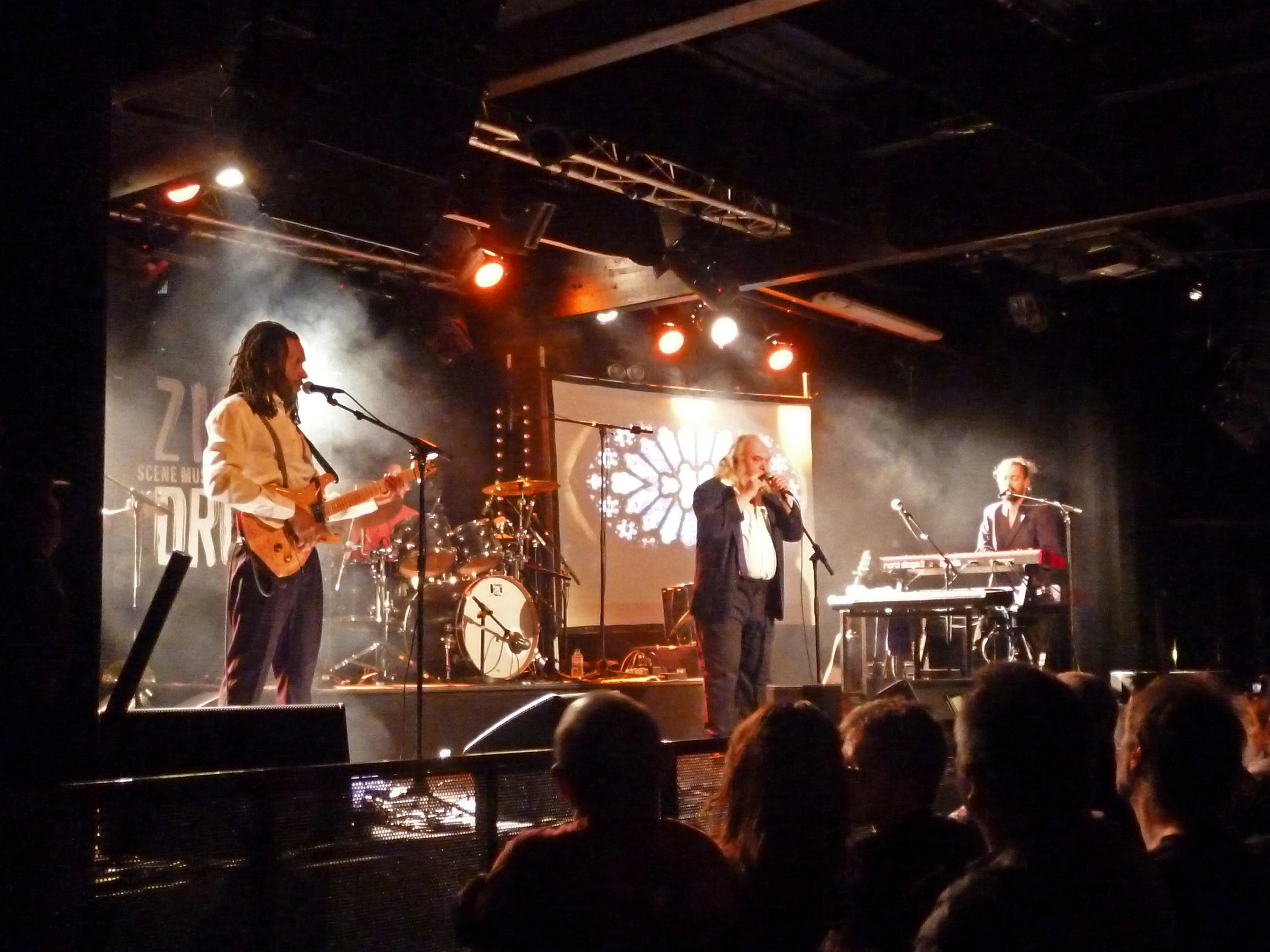 Le groupe français de rock progressif Ange en concert au Ziquodrome de Compiègne (Oise), le samedi 7 mai 2016. De gauche à droite, Hassan Hajdi (guitare), Benoît Cazzulini (batterie, au fond), Christian Décamps (chant) et Tristan Décamps (claviers).